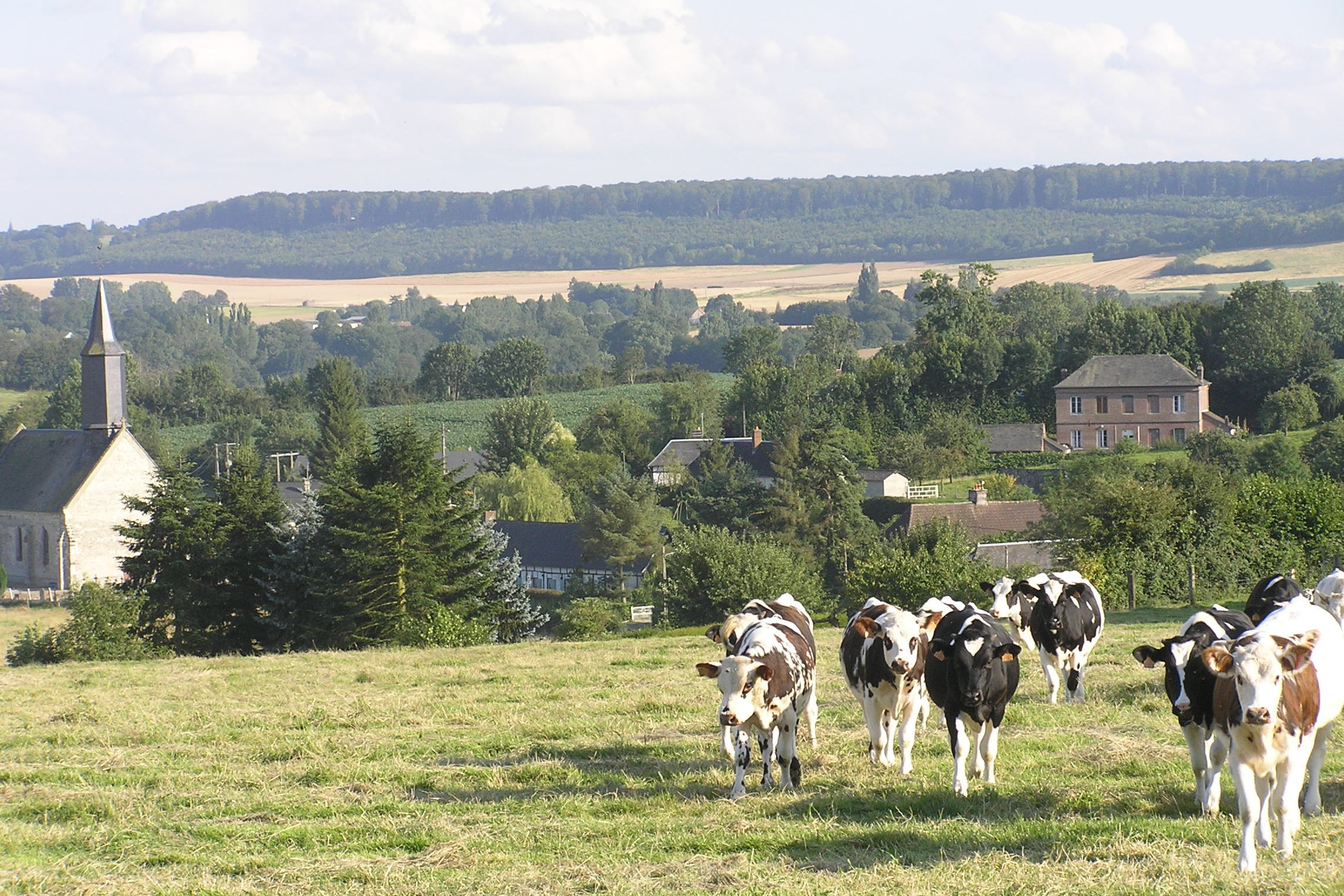 Vue d'ensemble du centre du village Mesangueville